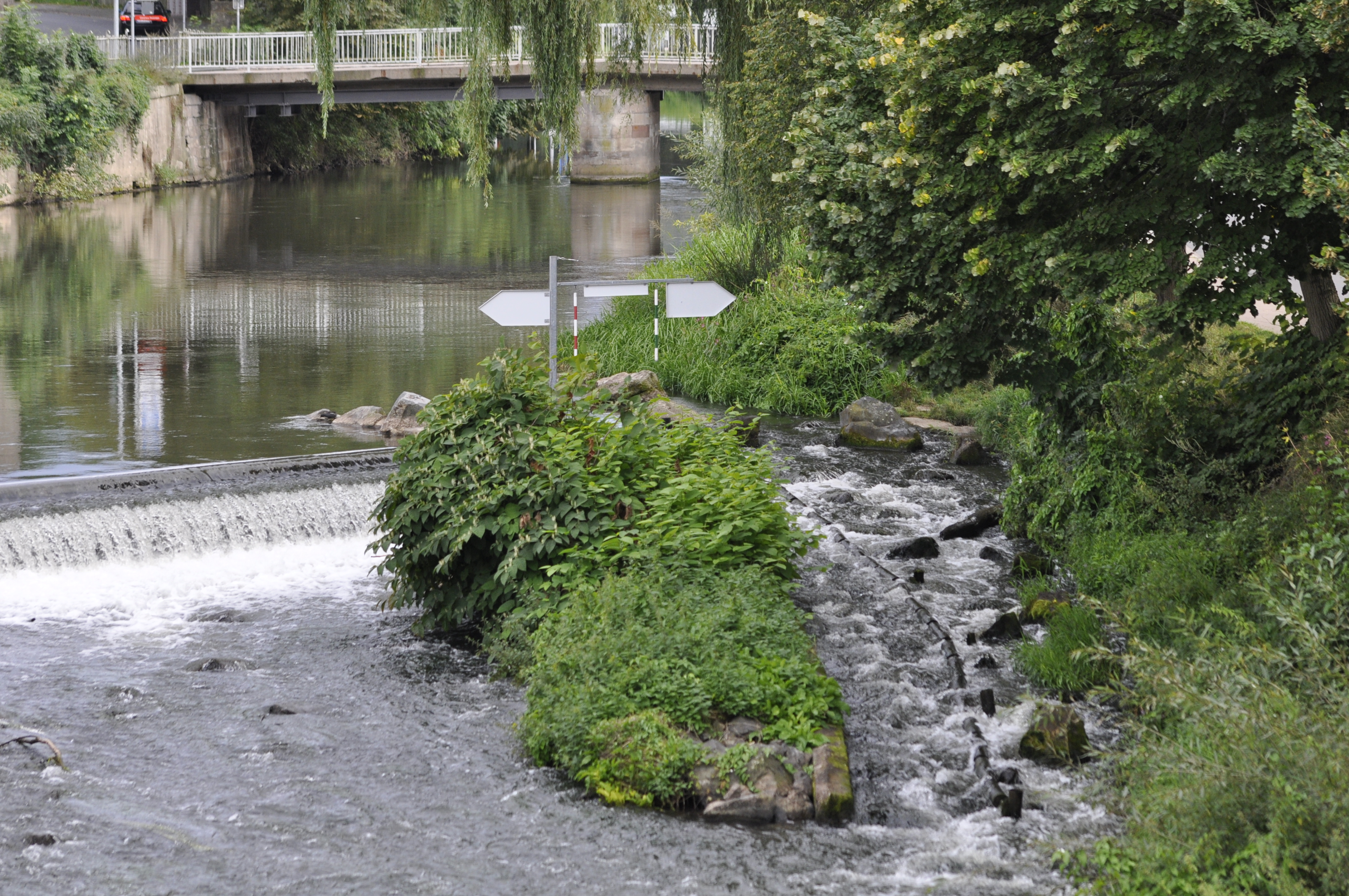 Fischtreppe an der Fulda in Hann. Münden, 24.8.2014. Foto: F. Welter-Schultes